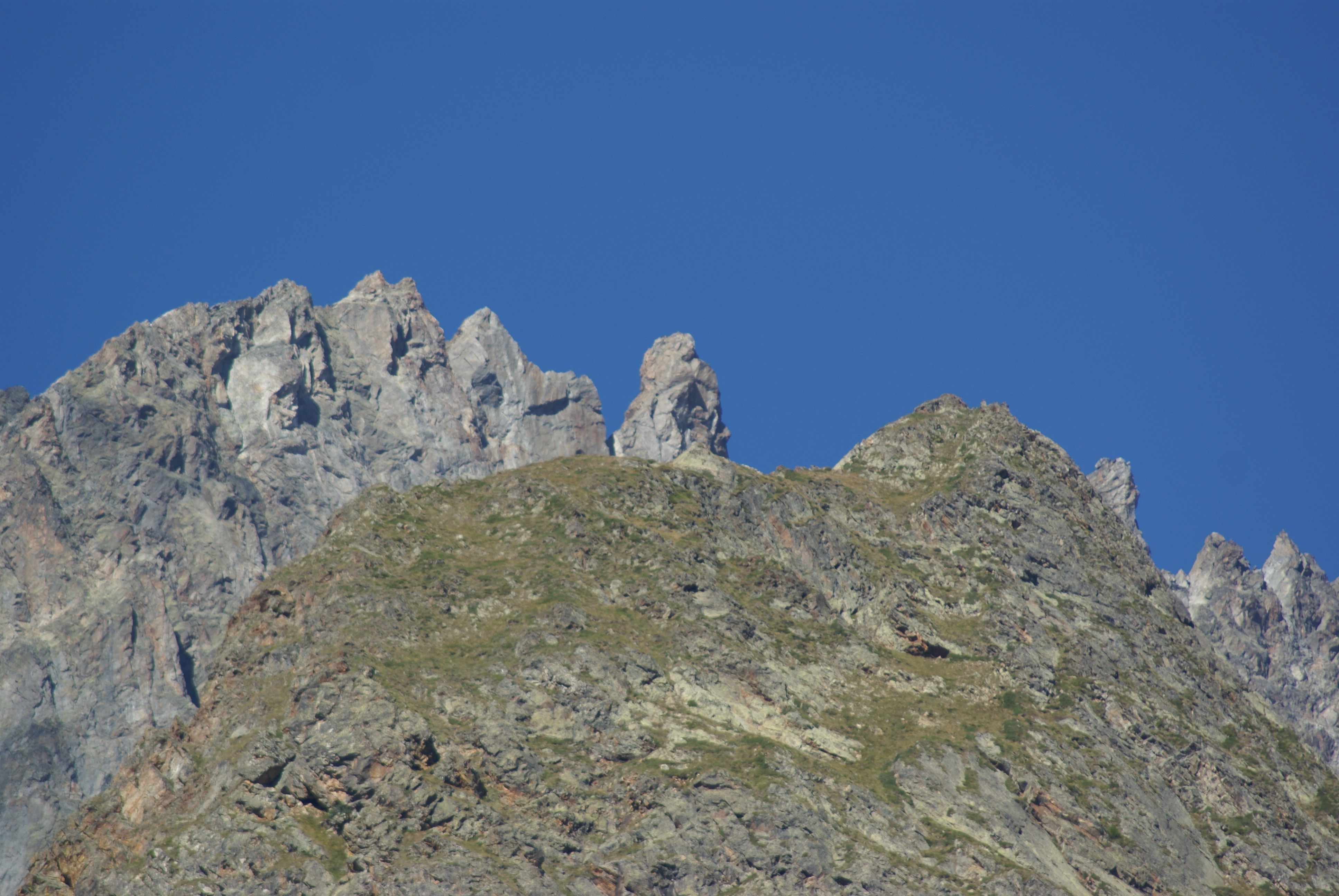 Monte Brouillard This is a photo of a monument which is part of cultural heritage of Italy.